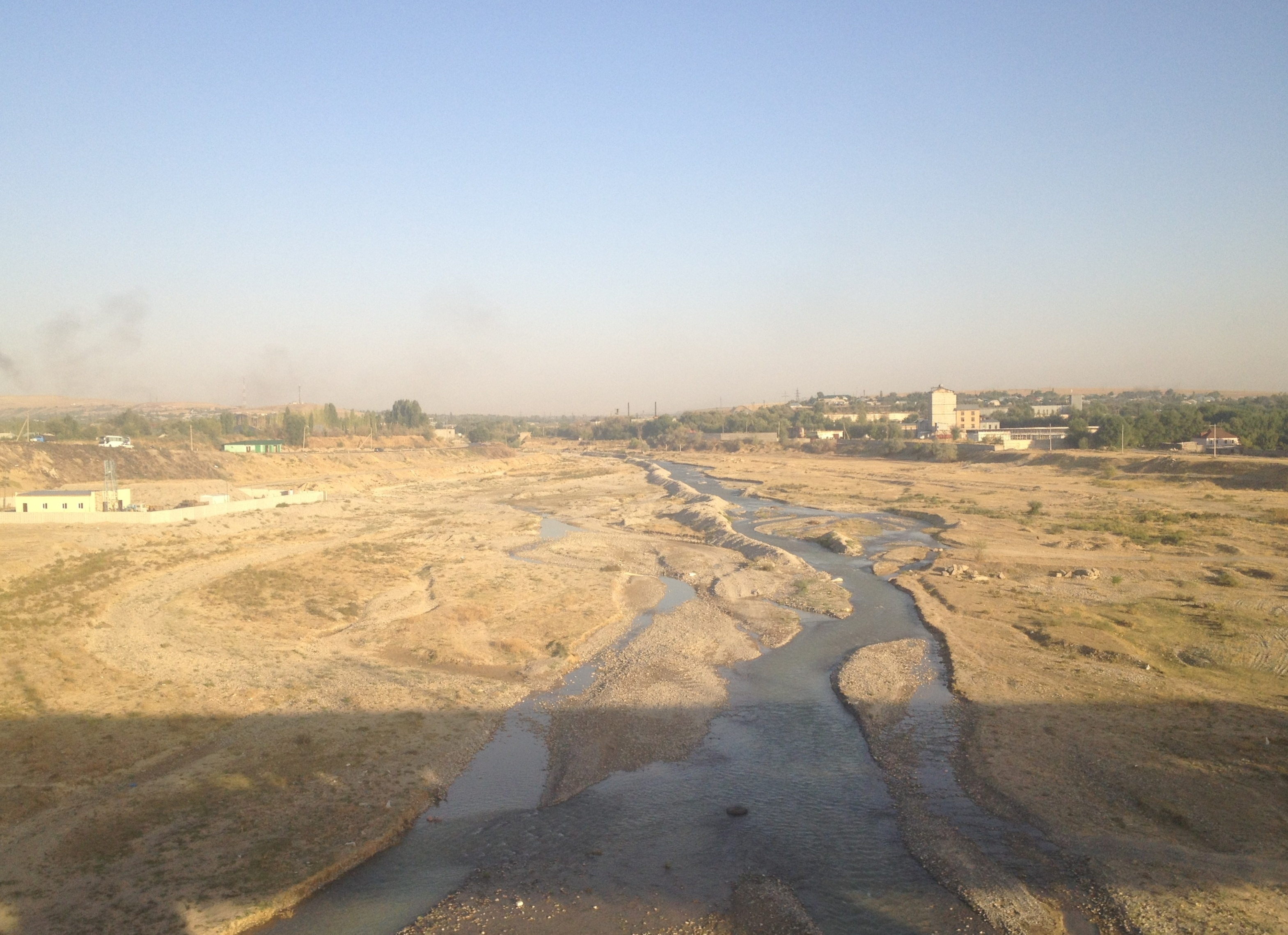 Река Аксу (приток Арыса)